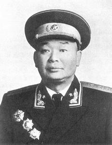 阎红彦上将，中国人民解放军开国上将。